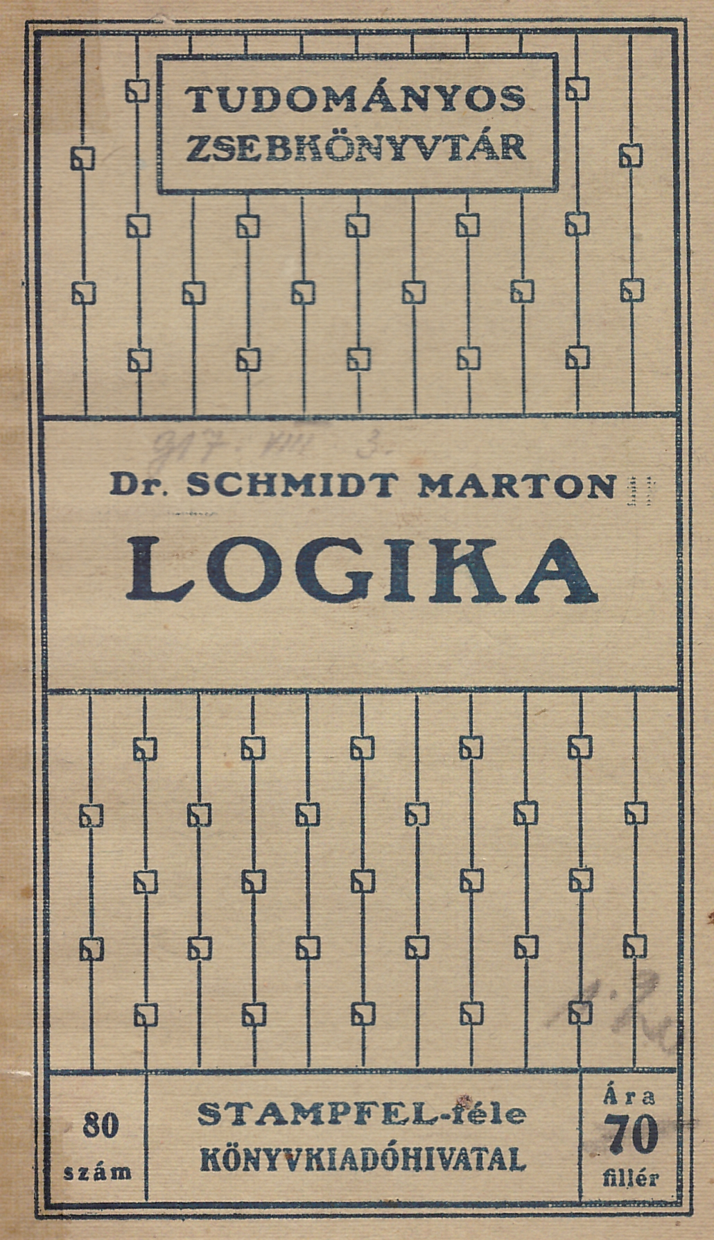 Schmidt Márton (1865-1928): Logika (1911)